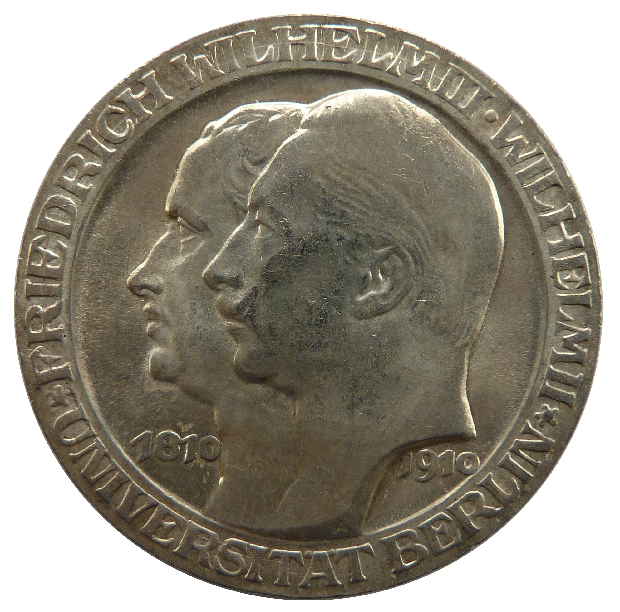 Vorderseite der 3-Mark-Gedenkmünze Preußens zur Jahrhundertfeier der Universität Berlin